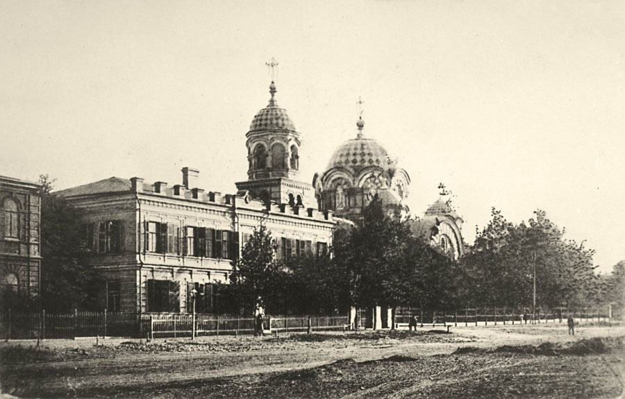 Петропавловская богадельня и церковь в честь иконы Божией Матери "Всех Скорбящих Радость". Ростов-на-Дону. Открытка.